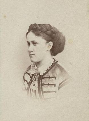 София Николаевна фон Шак, ур. Огарева (1842—1870)